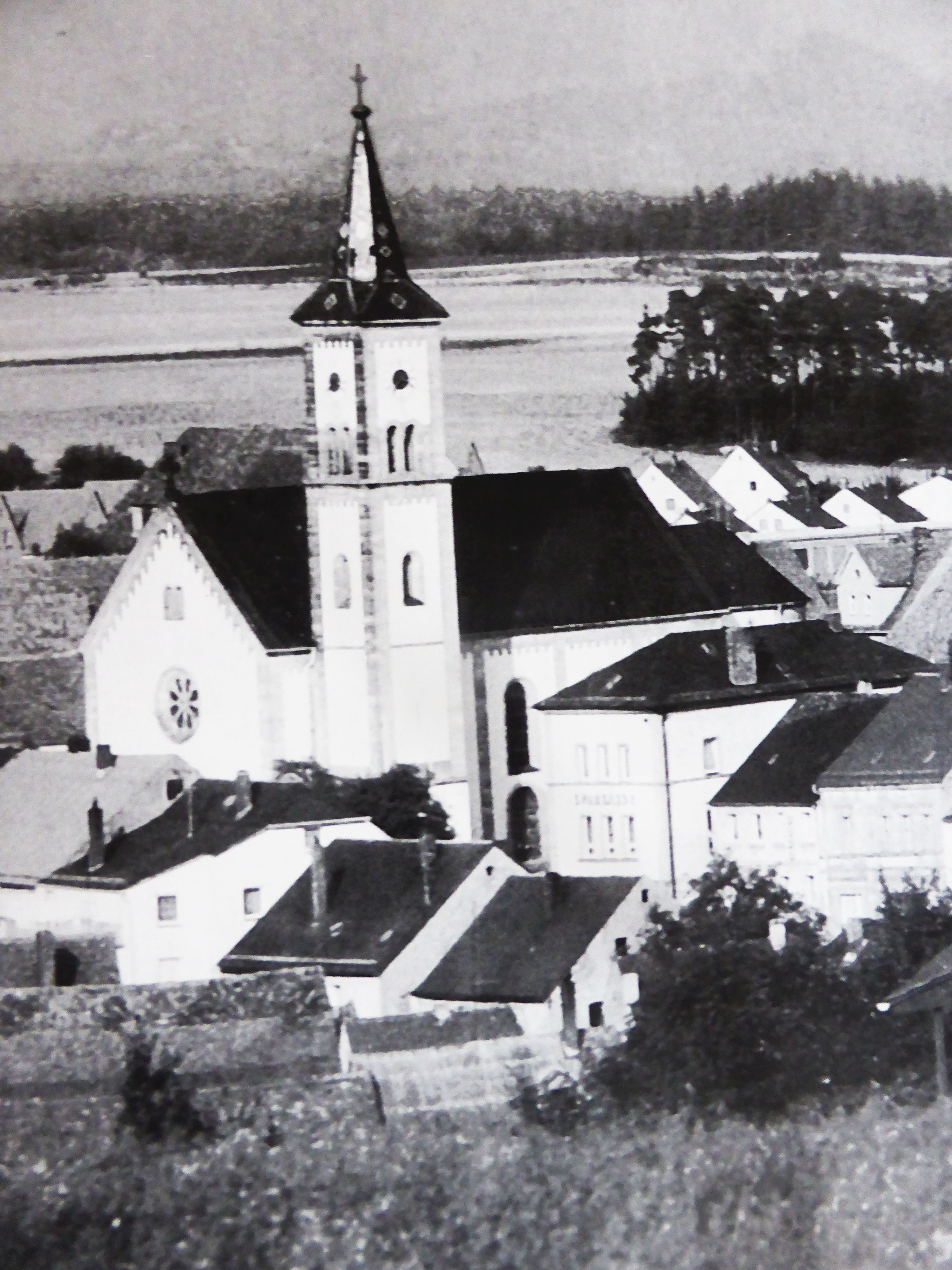 Mariä Himmelfahrt (Kirchenthumbach) (um 1920)